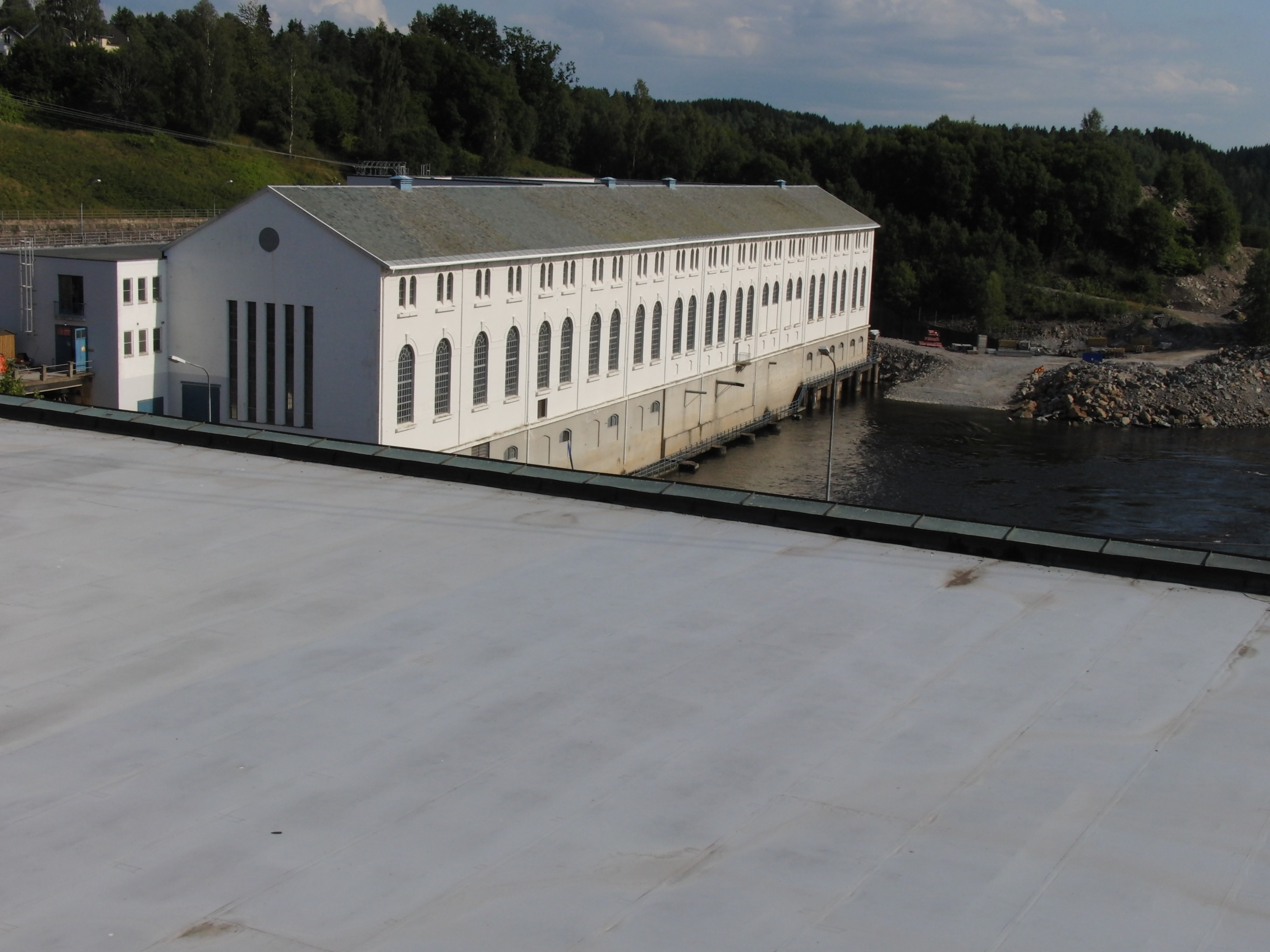 Gamle Kykkelsrud